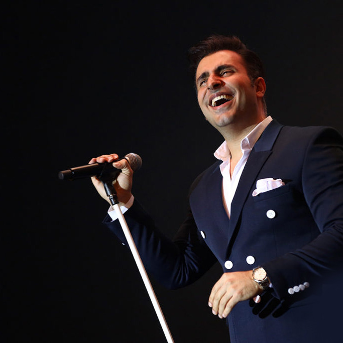 کنسرت علیرضا طلیسچی در سی و سومین جشنواره موسیقی فجر. عکاس : امیر فرزانه